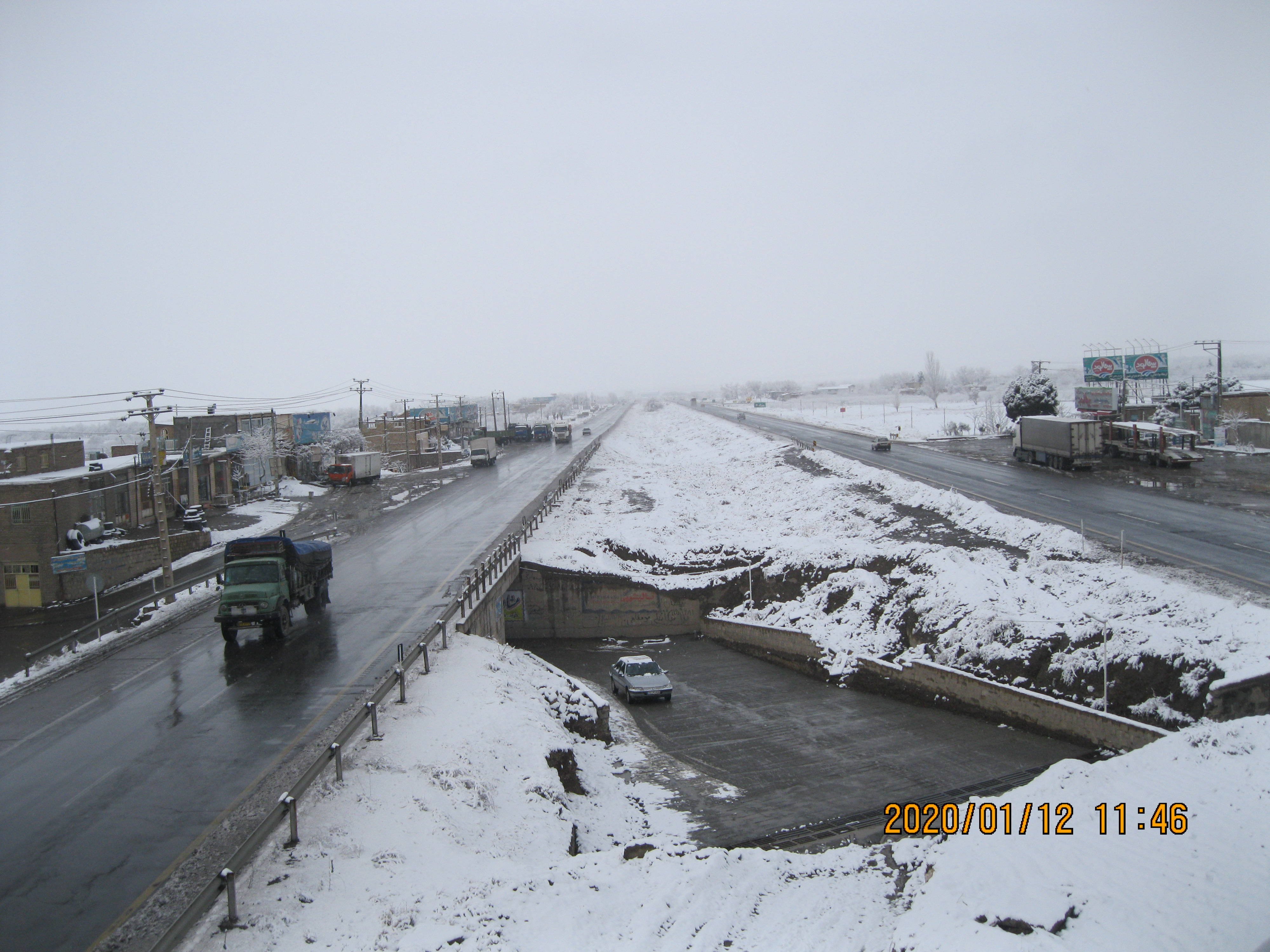 جاده ۴۴ (ایران) / بزرگراه مشهد-تهران - از روی پل هوایی حاجی‌آباد زبرخان نیشابور - عکاس: علی محمدی